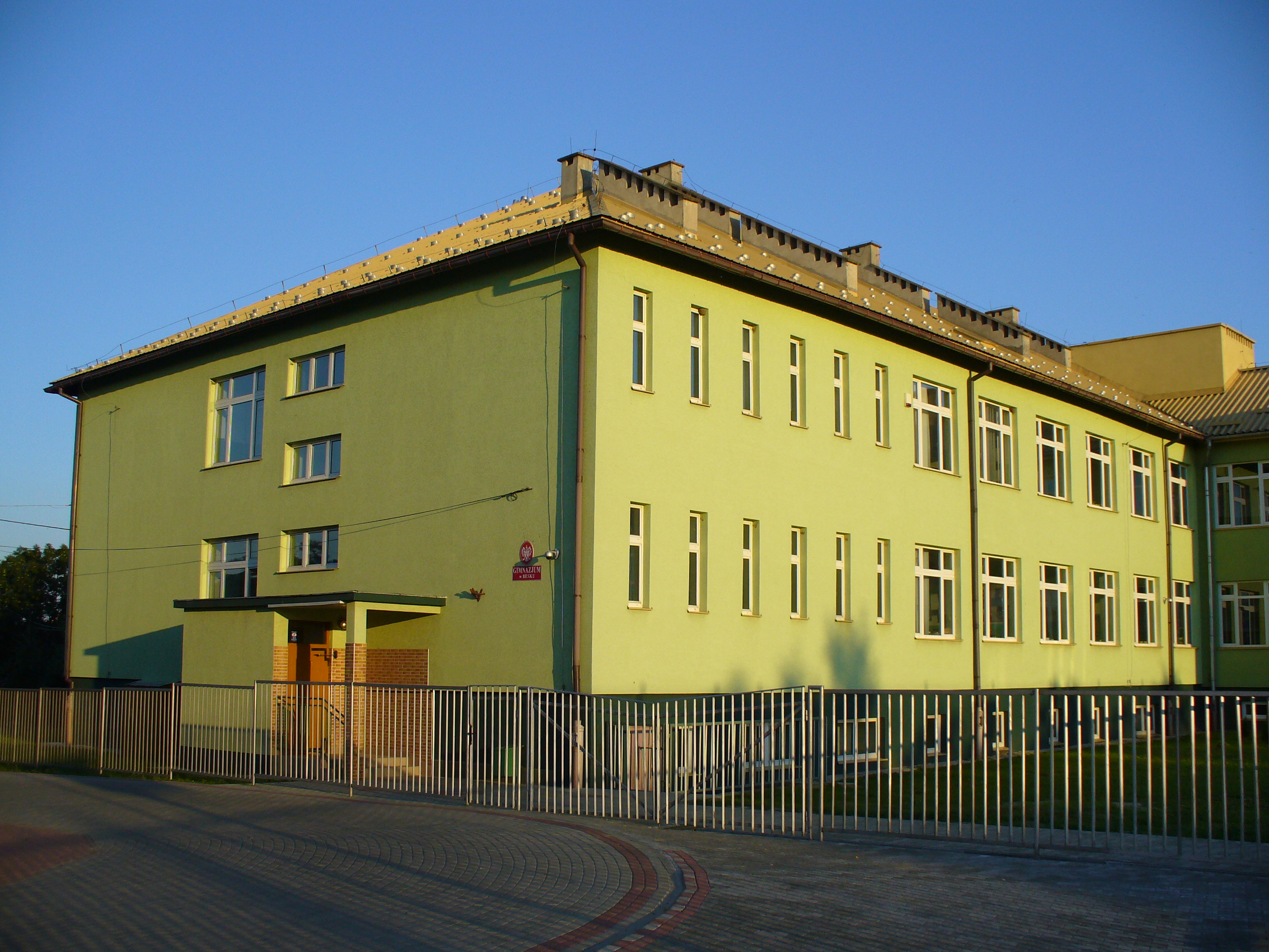 Besko - Gimnazjum